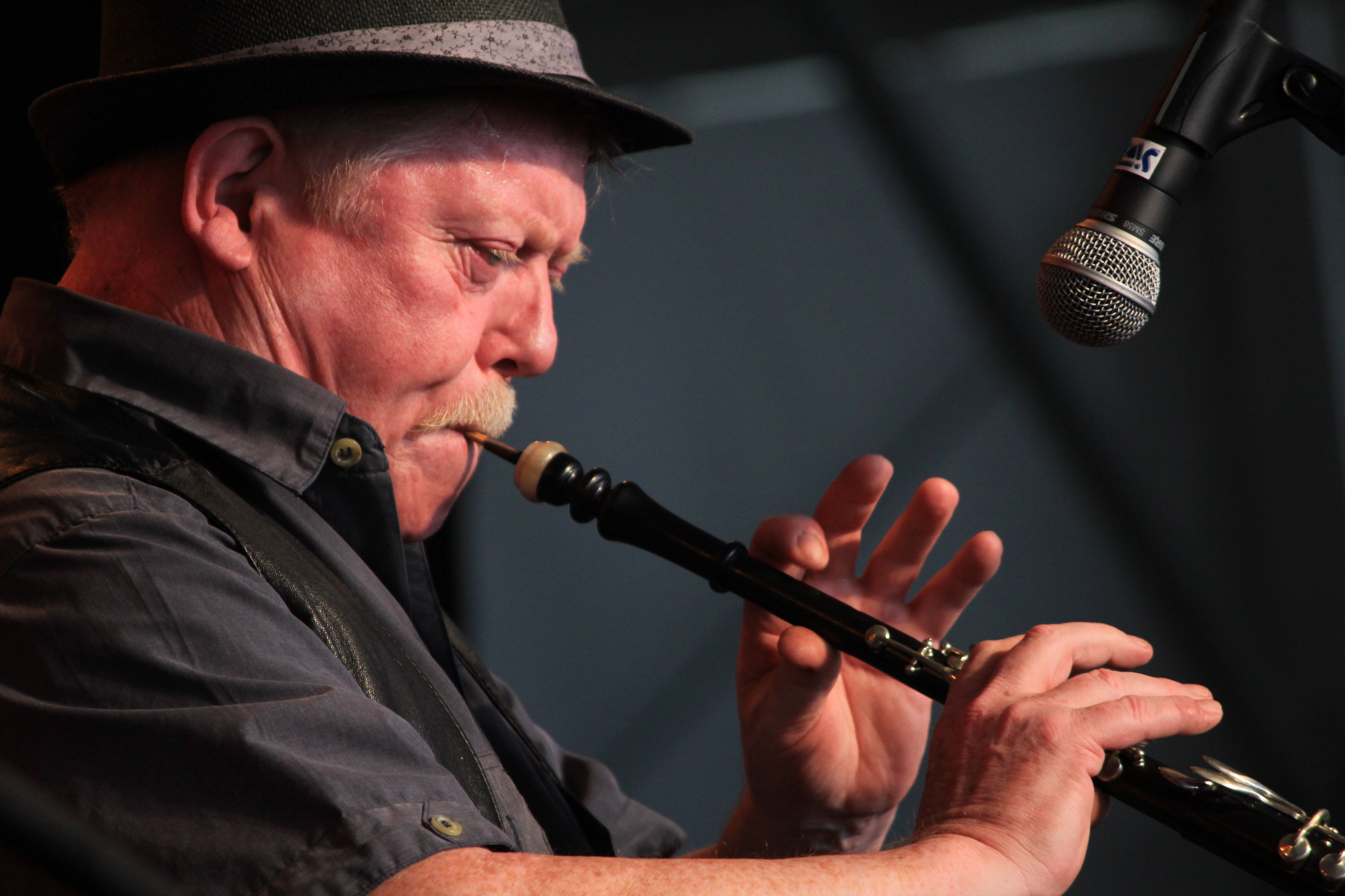 Concert de Skolvan lors du festival interceltique de Lorient 2014.